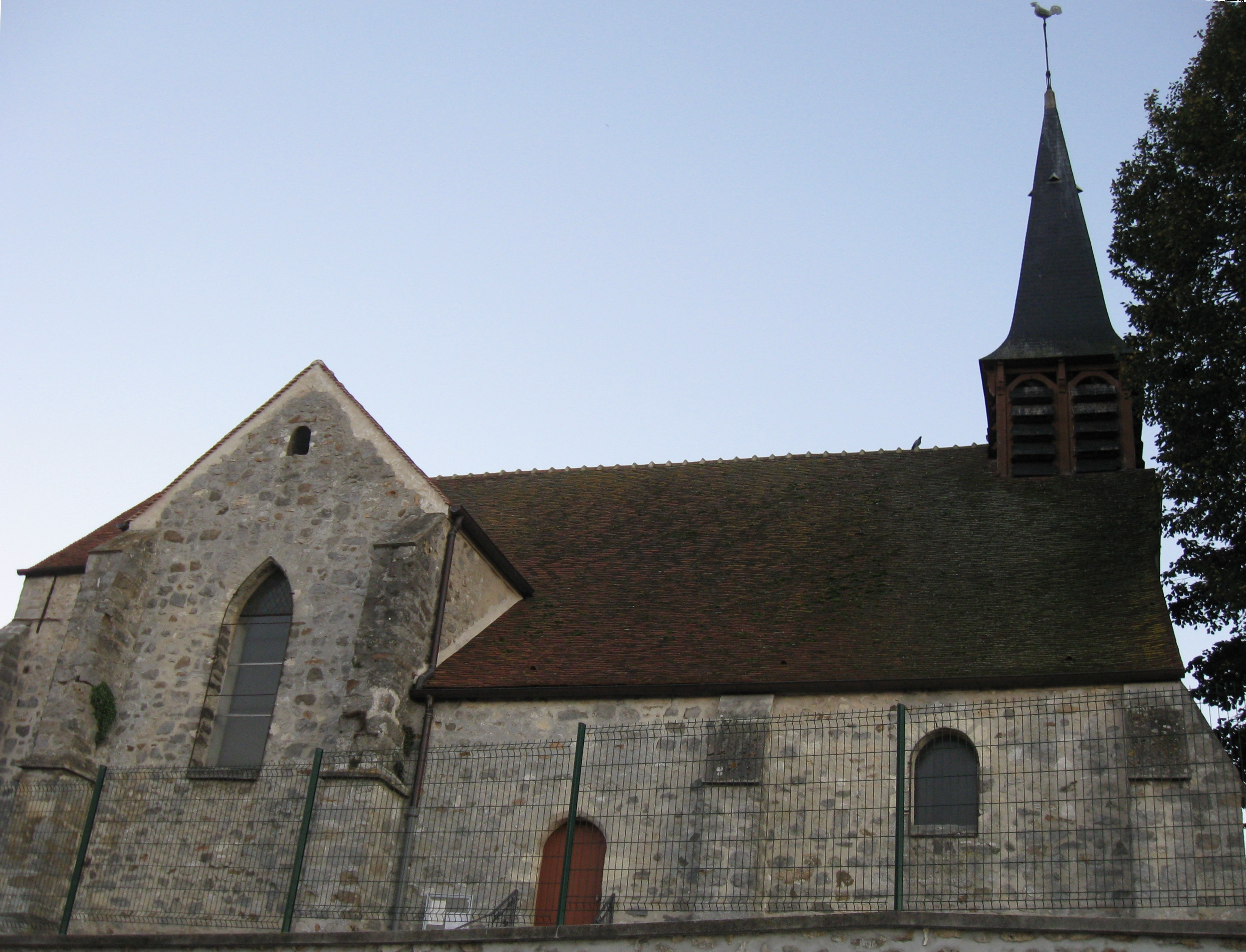 Église catholique Sainte Marie l'Assomption d'Étampes-sur-Marne.(département de l'Aisne , région Picardie).